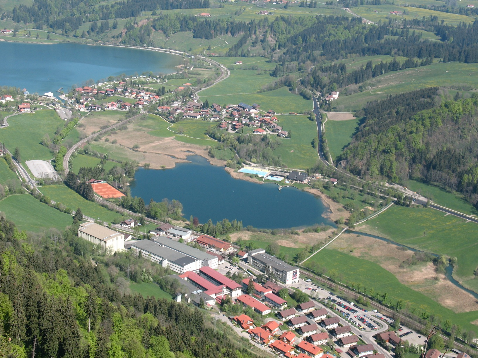 Blick von Horn-Kanzel auf Kleinen Alpsee und Bühl